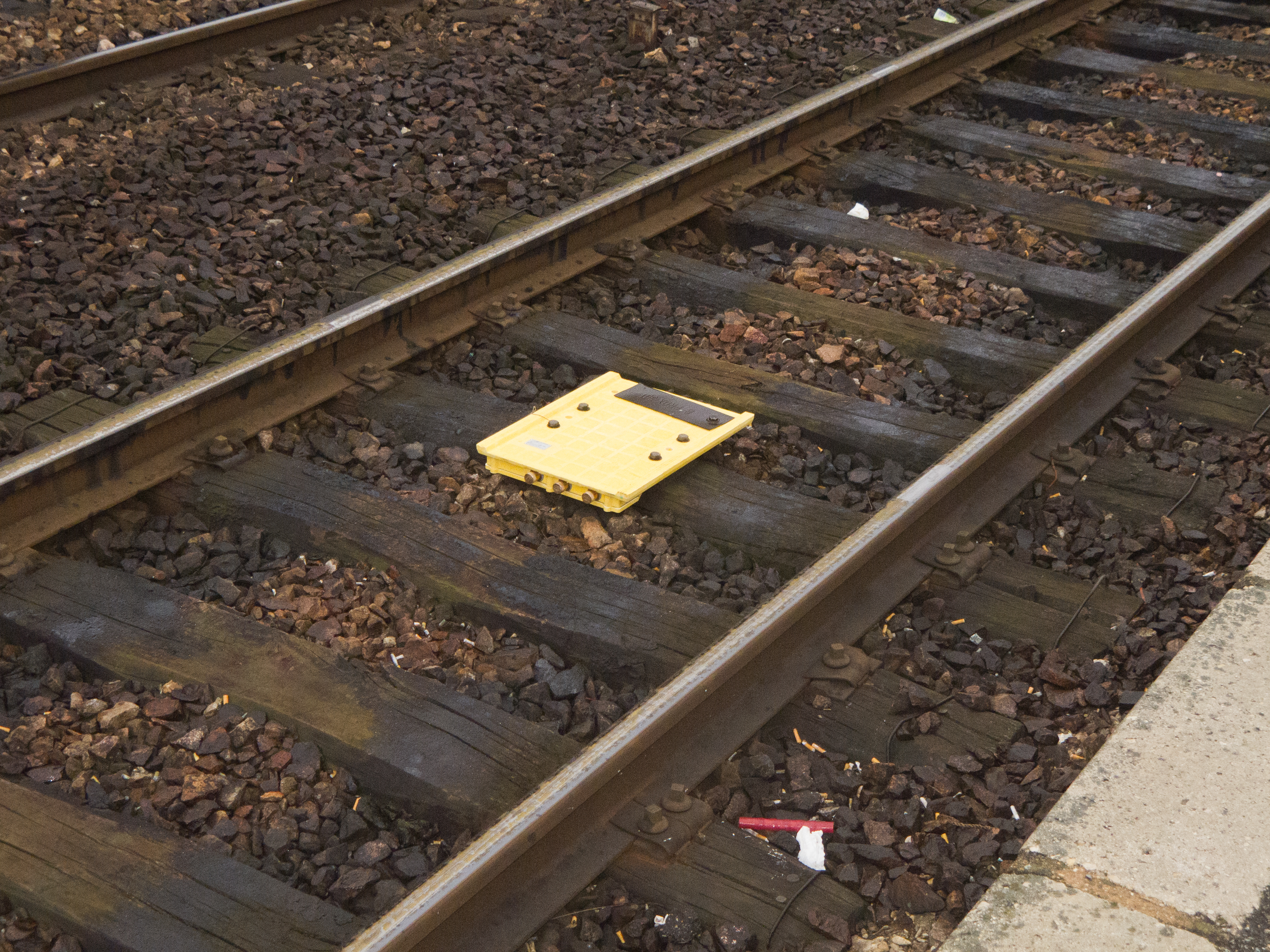 Gare de Corbeil-Essonnes (Corbeil-Essonnes, Essonne, France)